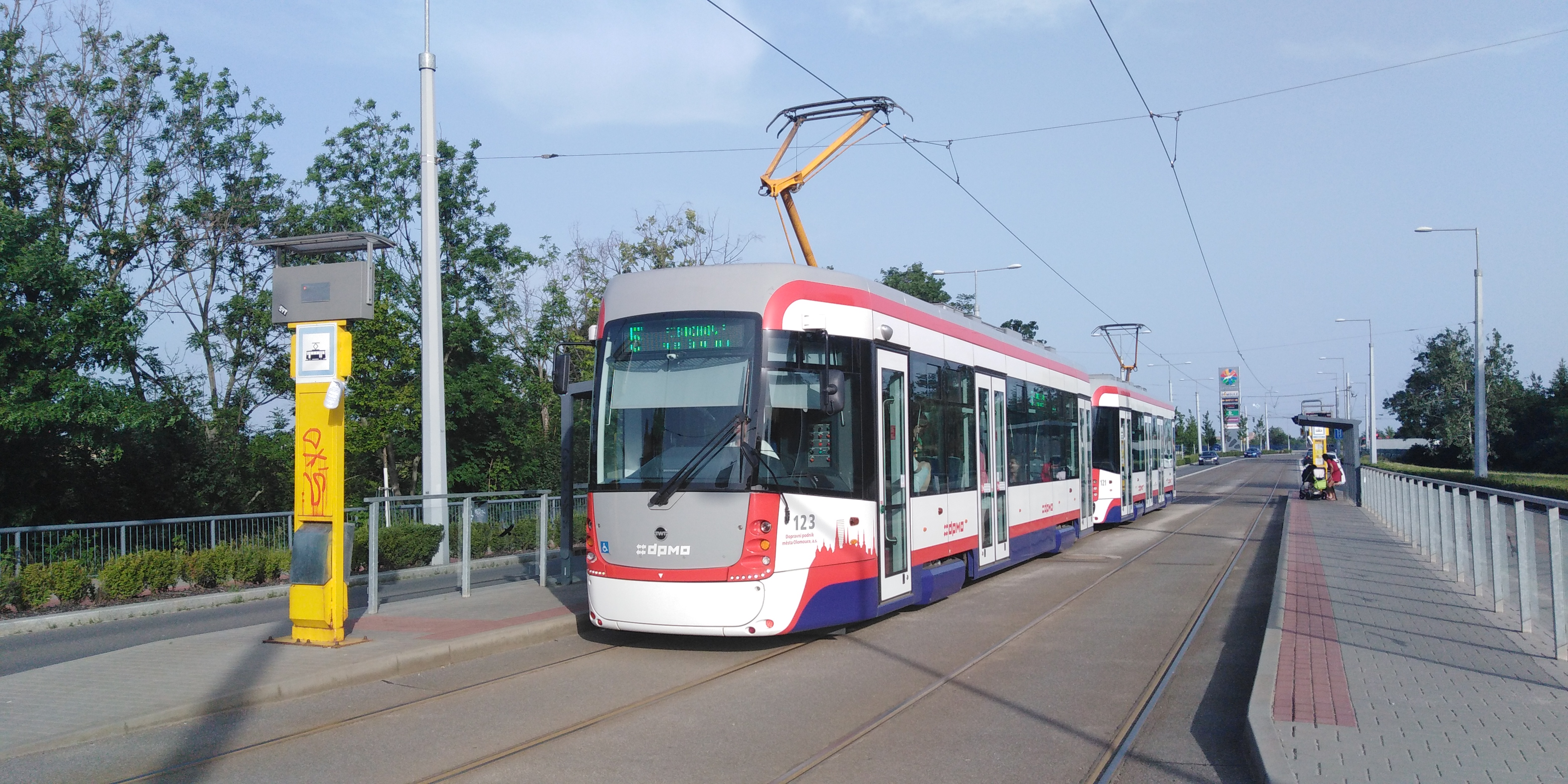 Souprava tramvají EVO1/o č. 123+121 obshuluje olomouckou zastávku V Kotlině